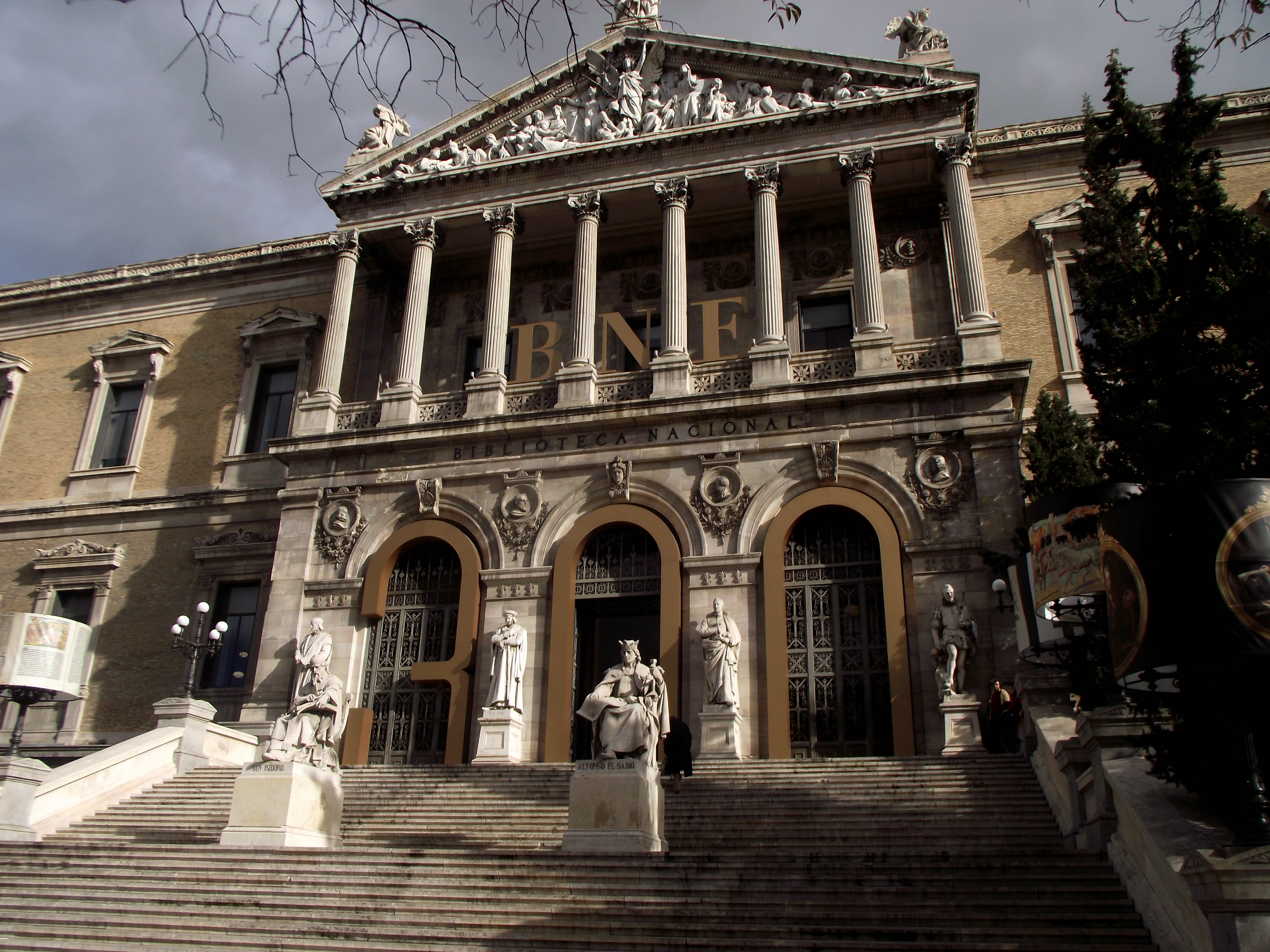 Edificio de la Biblioteca Nacional